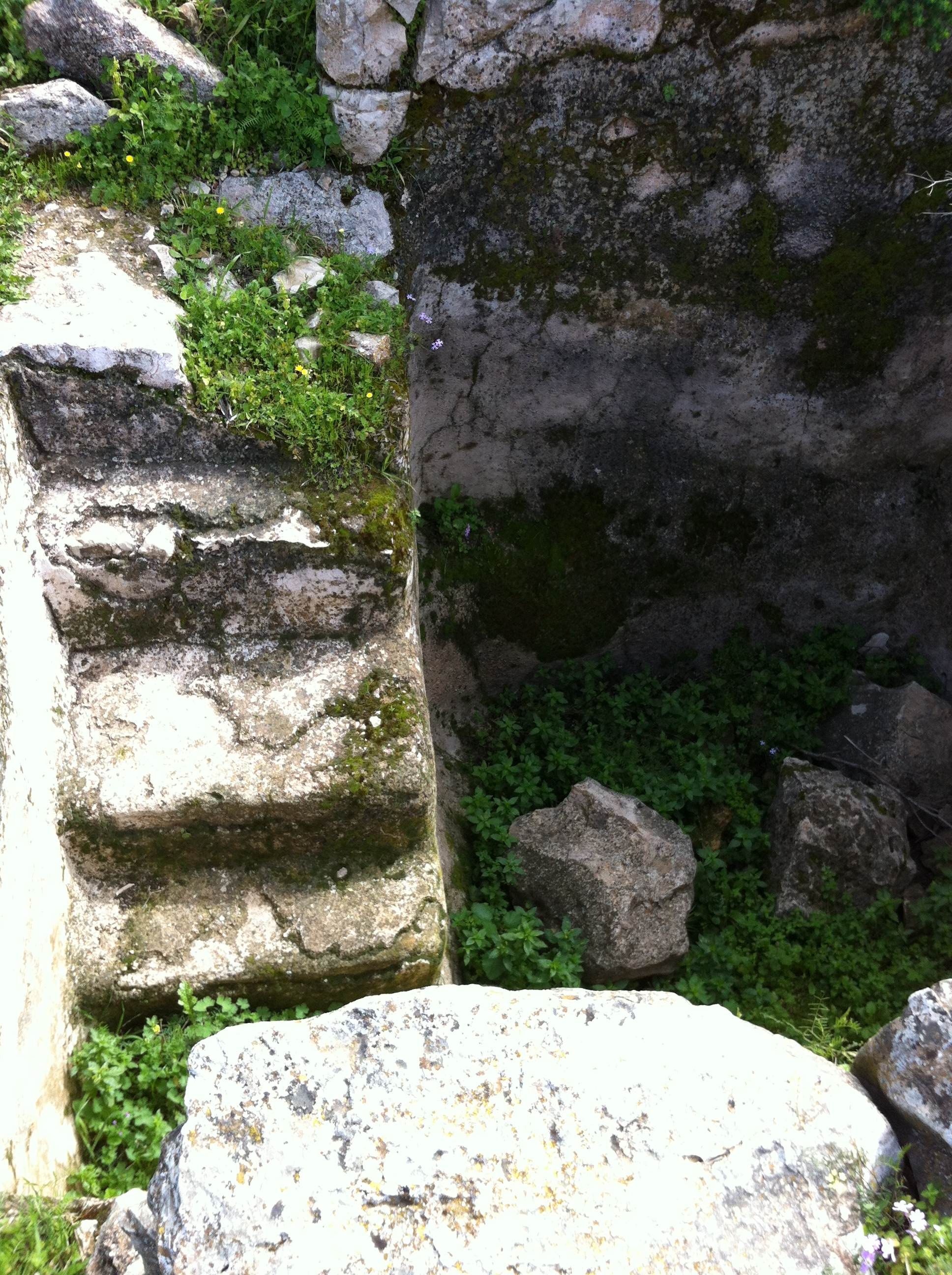 מצודת קרן נפתלי - המקווה